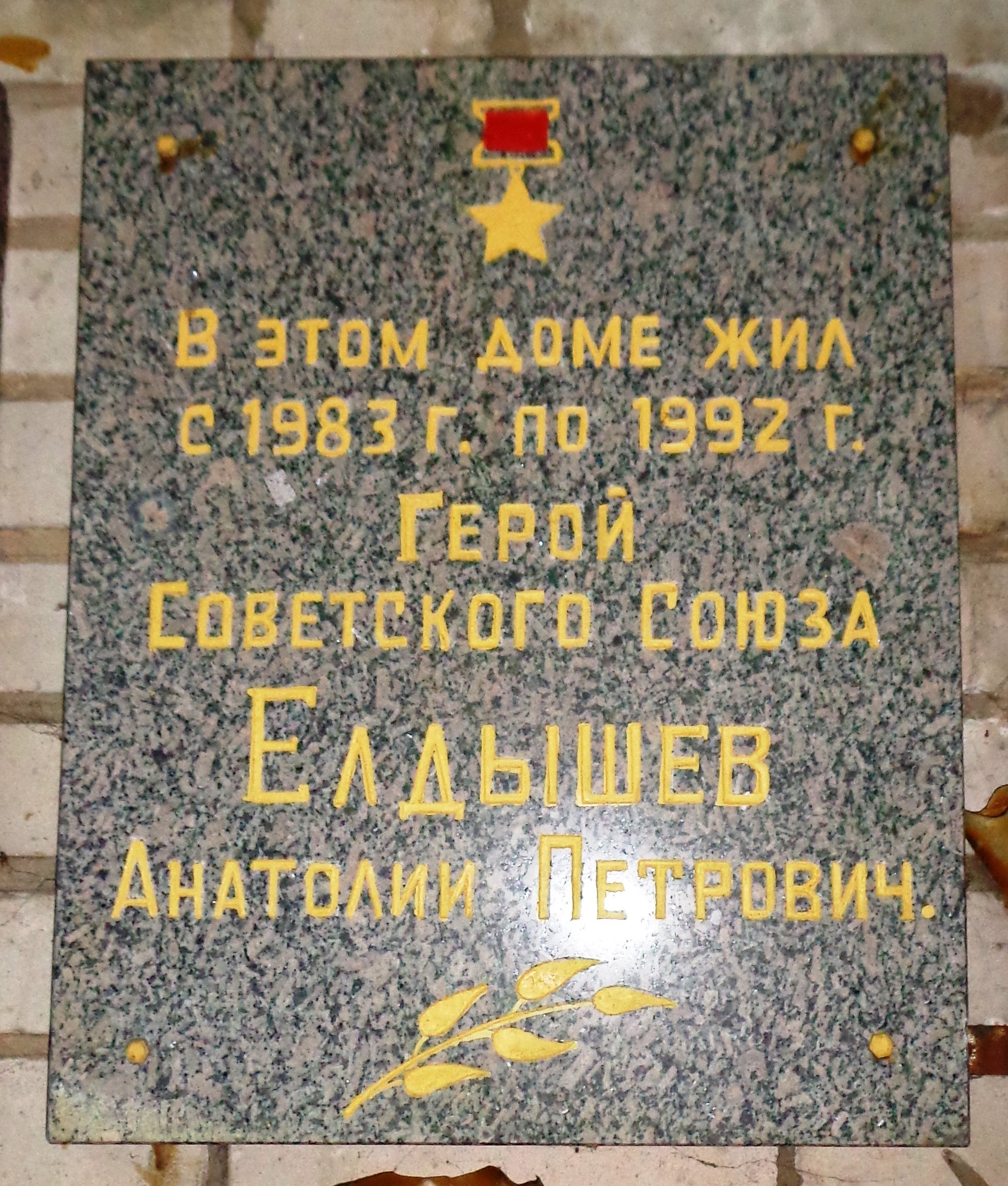 Мемориальная доска на доме в поселке Монино Московской области, где проживал Герой Советского Союза А.П. Елдышев